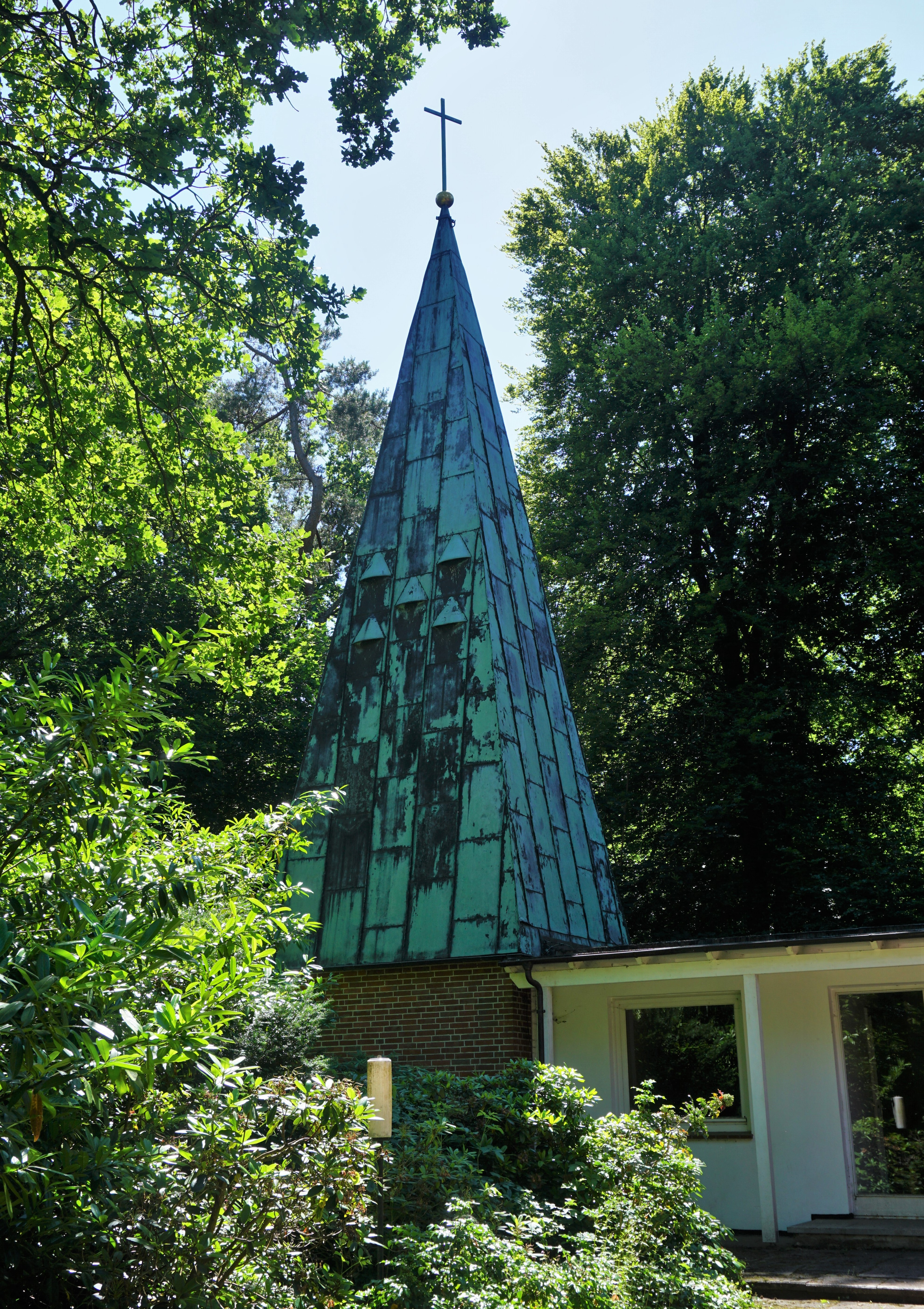 Chapel tower of the Saint Mauritius Chapel in Bohndorf in the district of Uelzen.